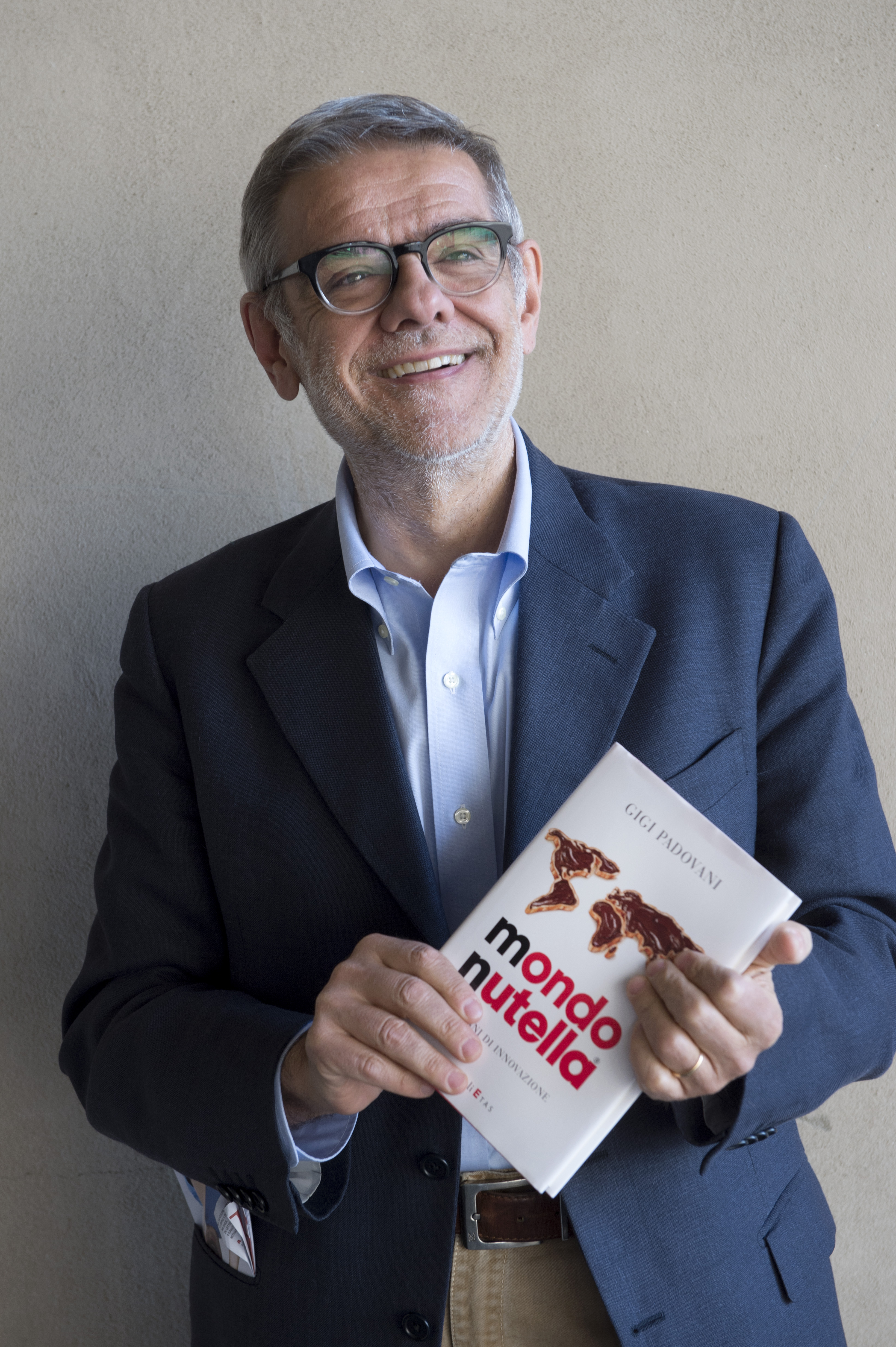 Gigi padovani con il suo libro Mondo Nutella